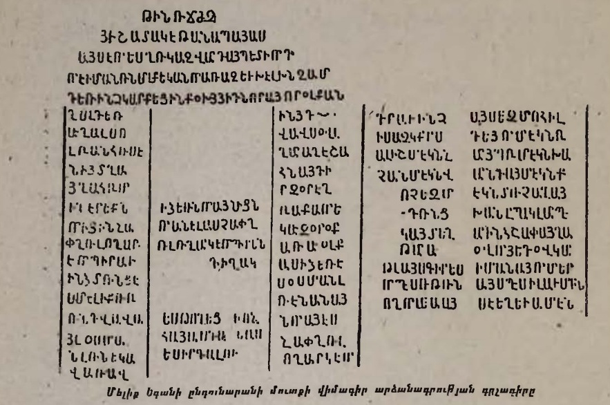 Մելիք Եգանի ընդունարանի արձանագրությունը